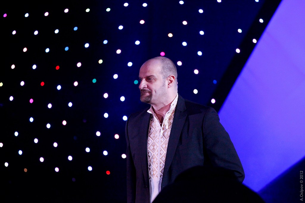 Матч всех звезд баскетбольной Суперлиги 2012. Киев. Ukrainian All-star